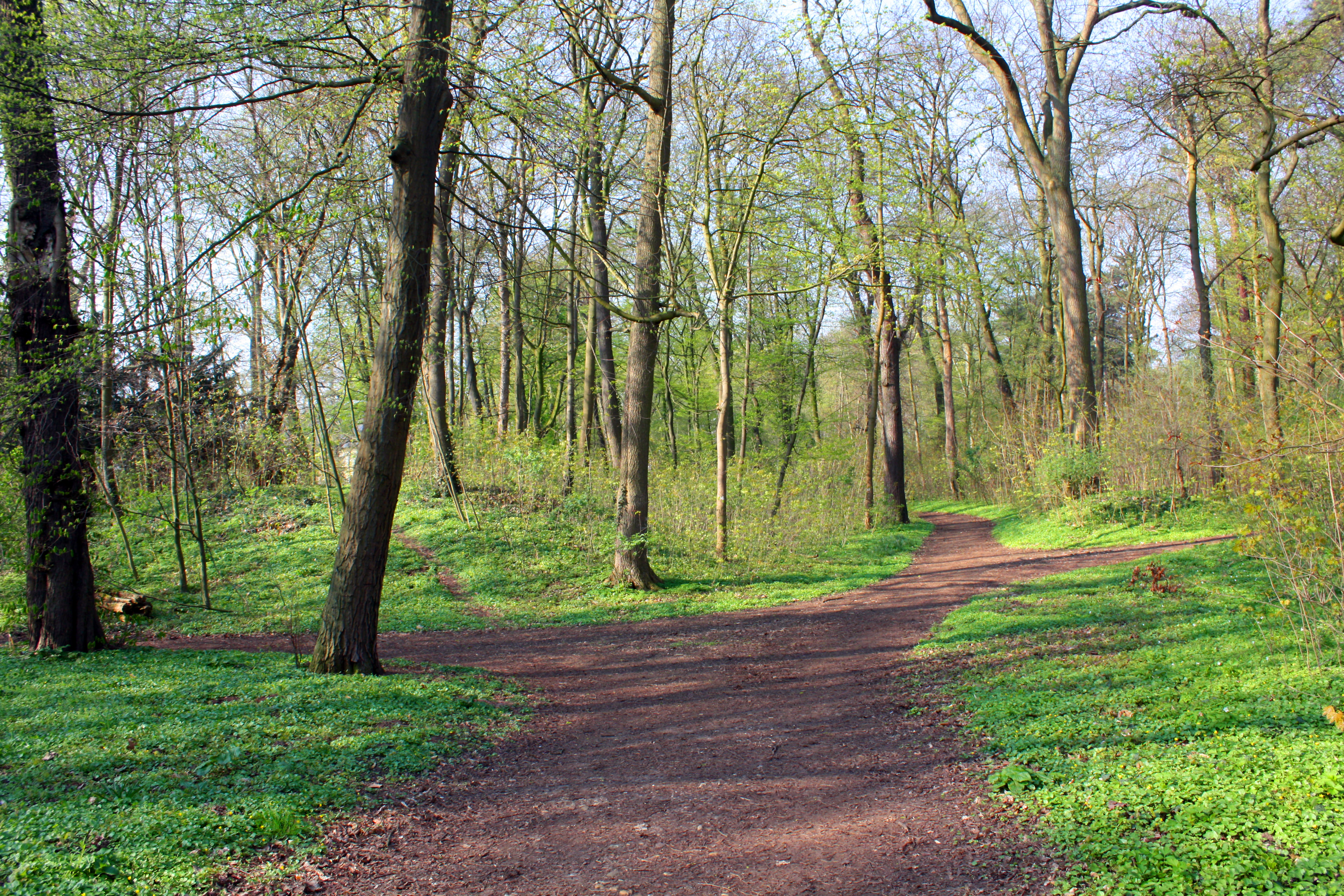 Schlosspark Lechenich, Unterholz und Krautschicht